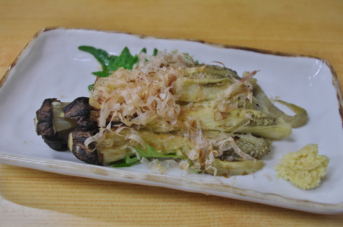 野菜の茄子をつかった料理